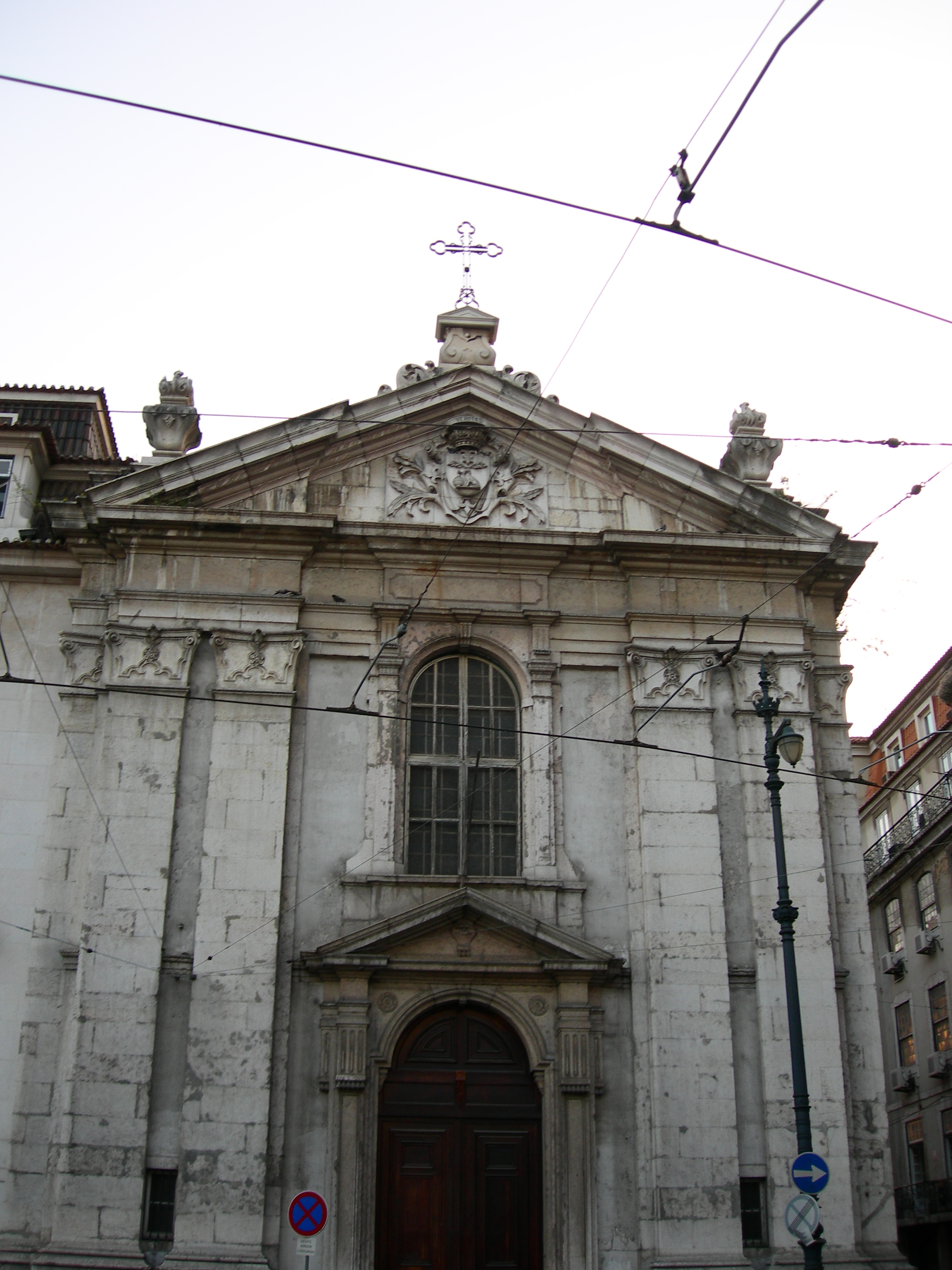 Igreja do Corpo Santo This file was uploaded for Wiki Loves Monuments in Portugal with the unique identifier 97005032.